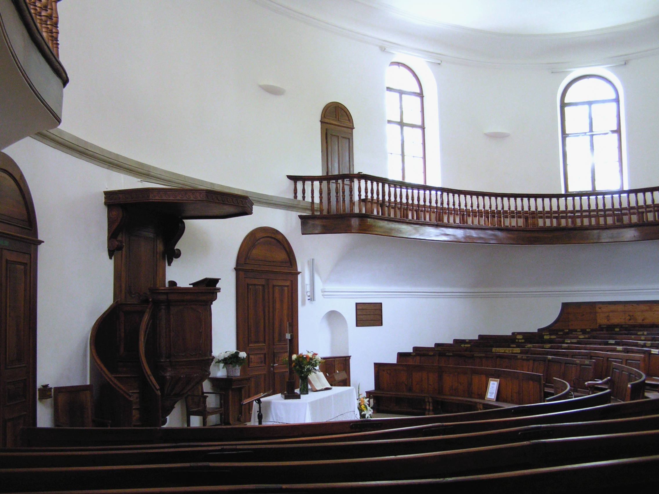 Route de Chêne 153, Chêne-Bougerie. Intérieur du temple, église réformée.